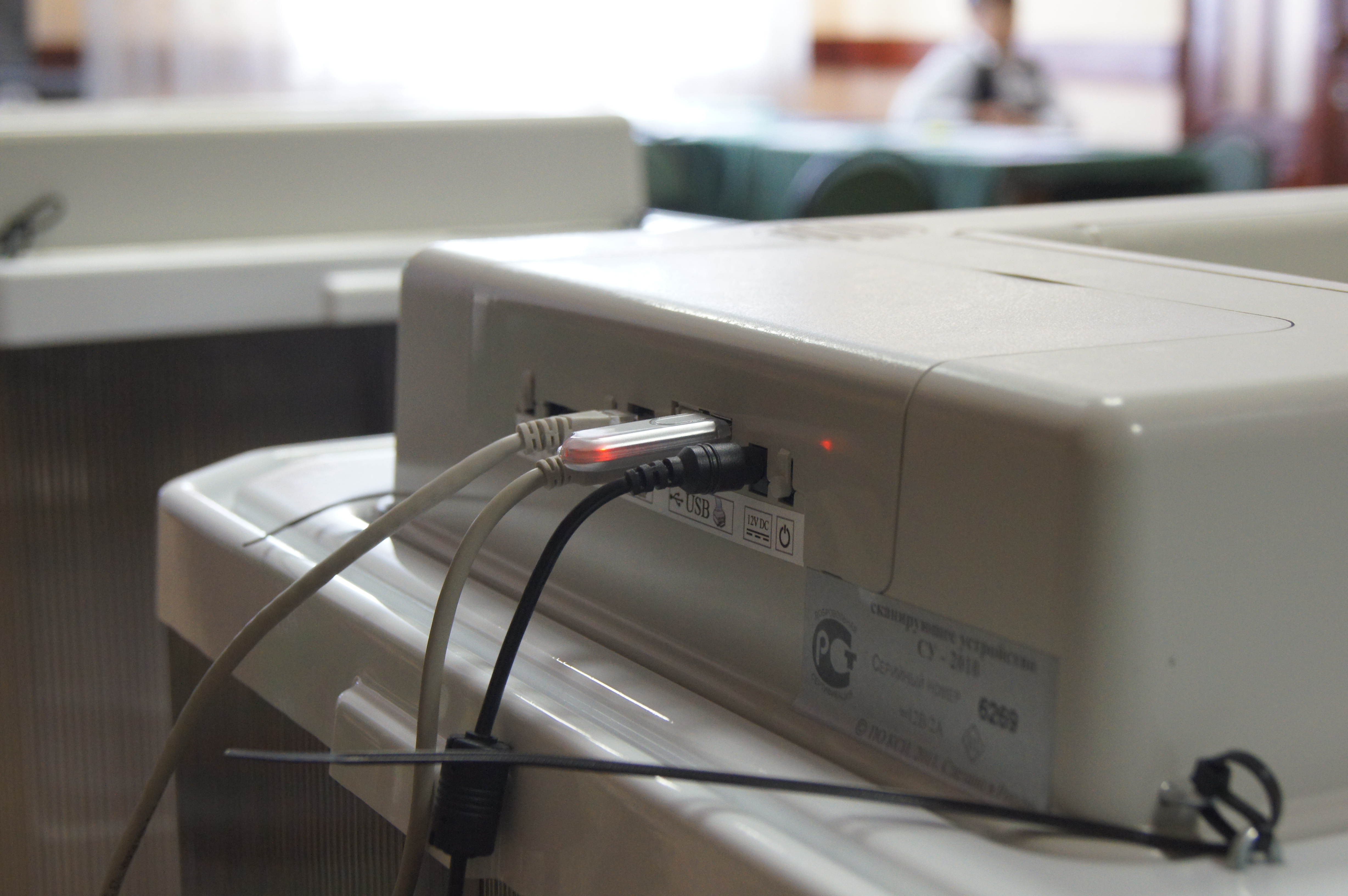 Ведущий сканер КОИБ с установленным ключевым носителем